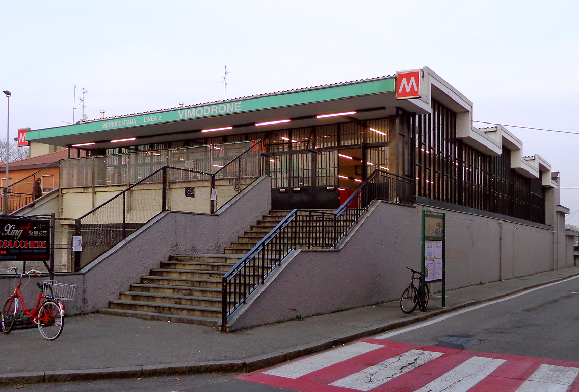 Stazione di Vimodrone della metropolitana di Milano, il fabbricato del mezzanino